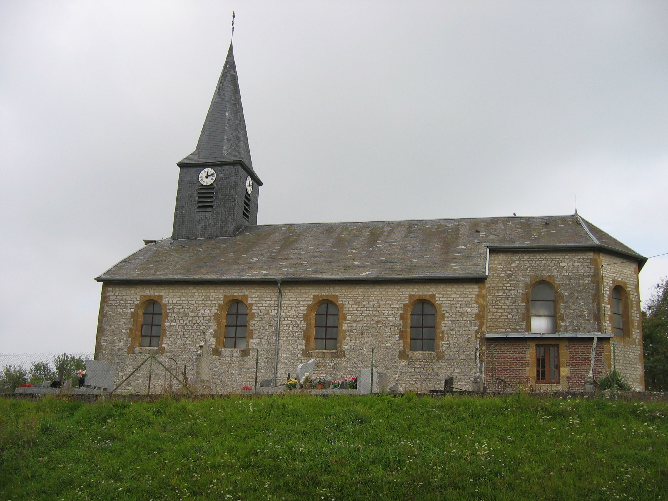 Eglise de Sommerance, Ardennes, France